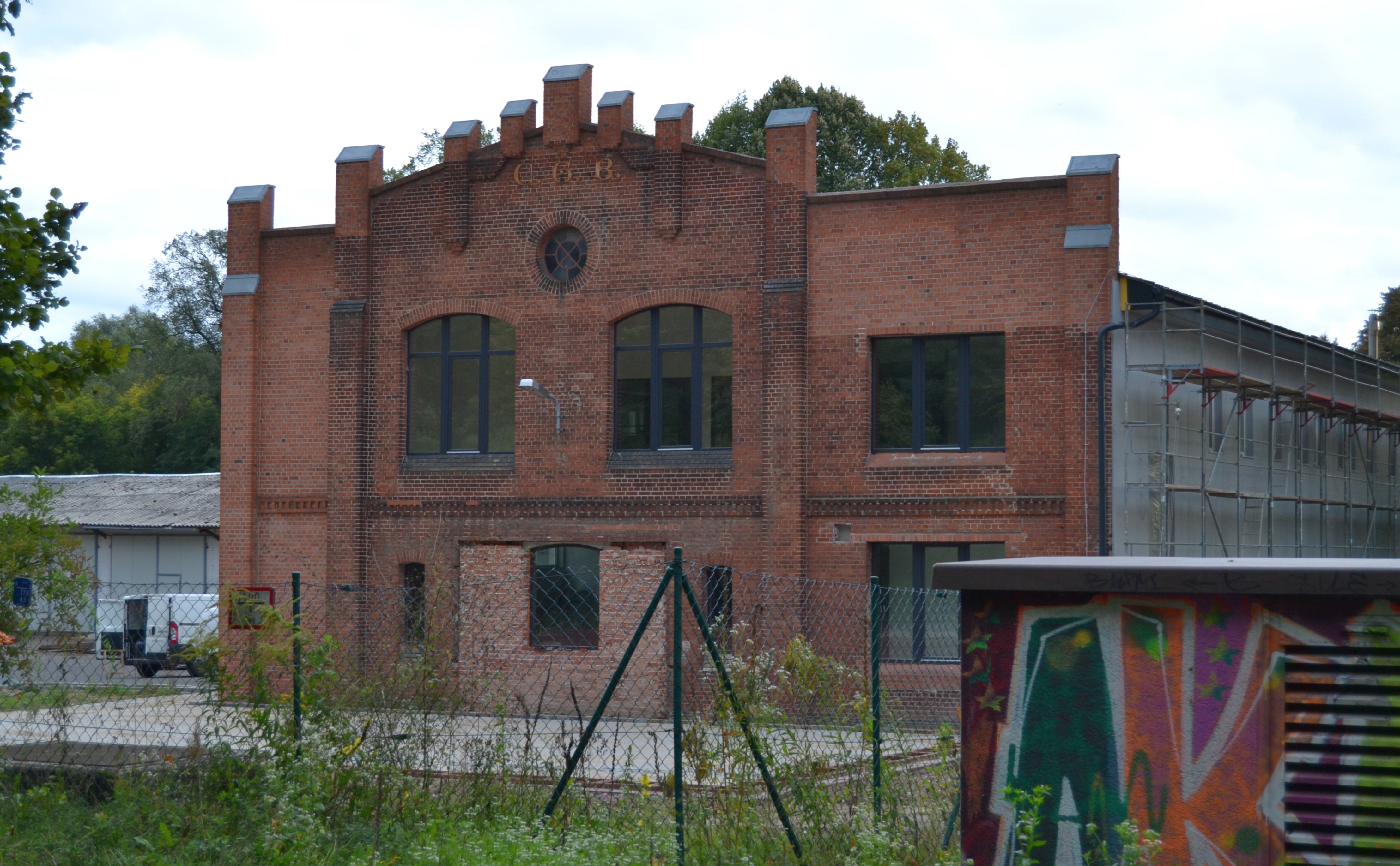 Maschinenbaufrabrik C.G. Bohm in Fredersdorf, Gemeinde Fredersdorf/Vogeldsorf.